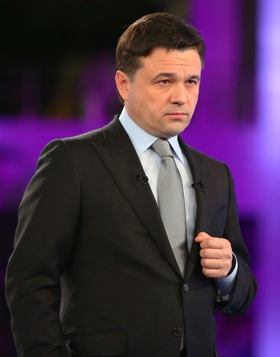 А. Воробьев в прямом эфире телеканала «360° Подмосковье» Автор: Анатолий Лизунов Источник: Пресс-служба Губернатора и Правительства МО